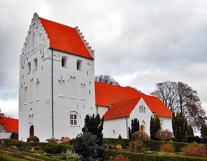 fra sydvest